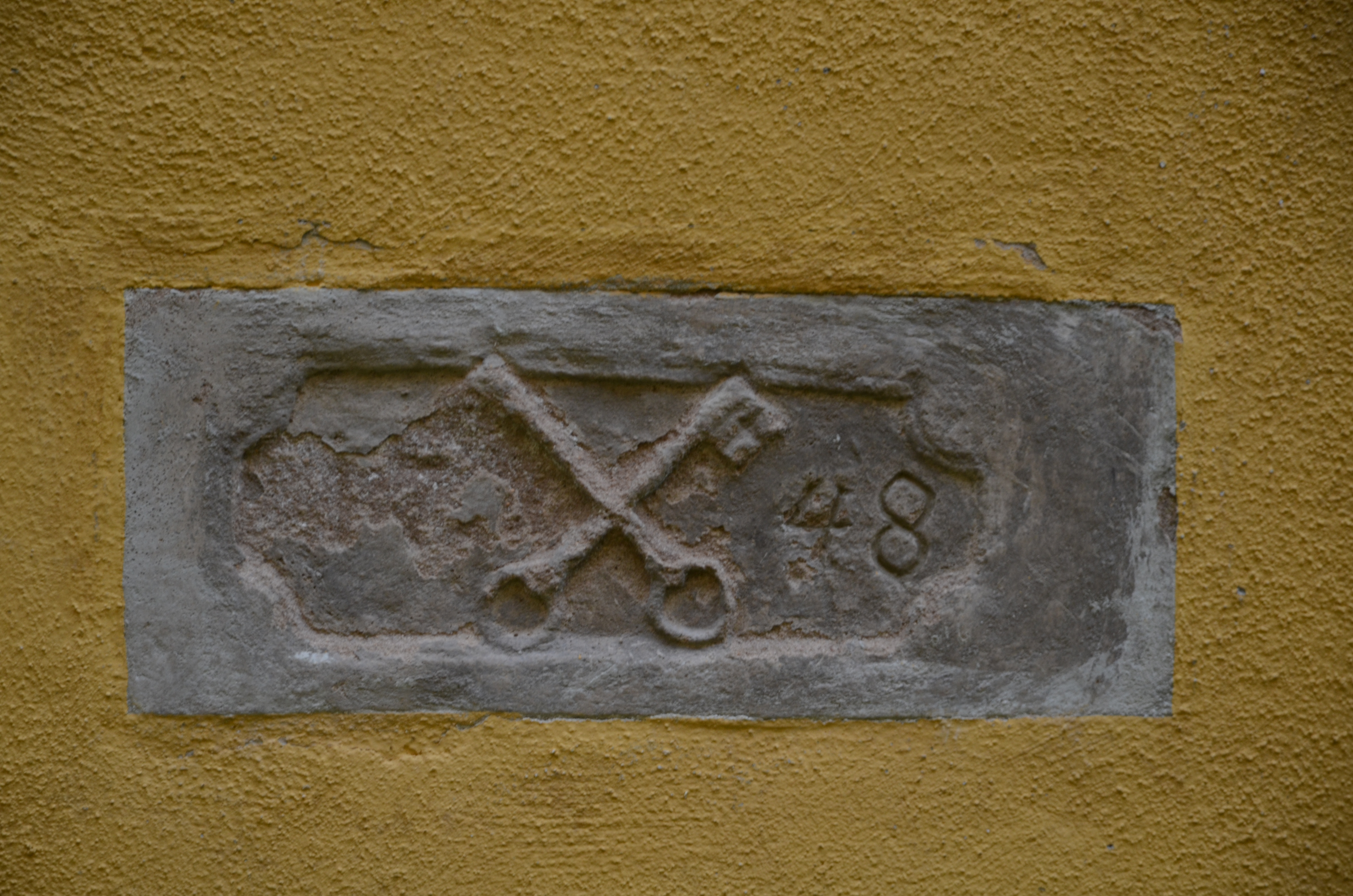 Dinkelsbühl Dr. Martin Luther Straße 8, Jahreszahl 1748